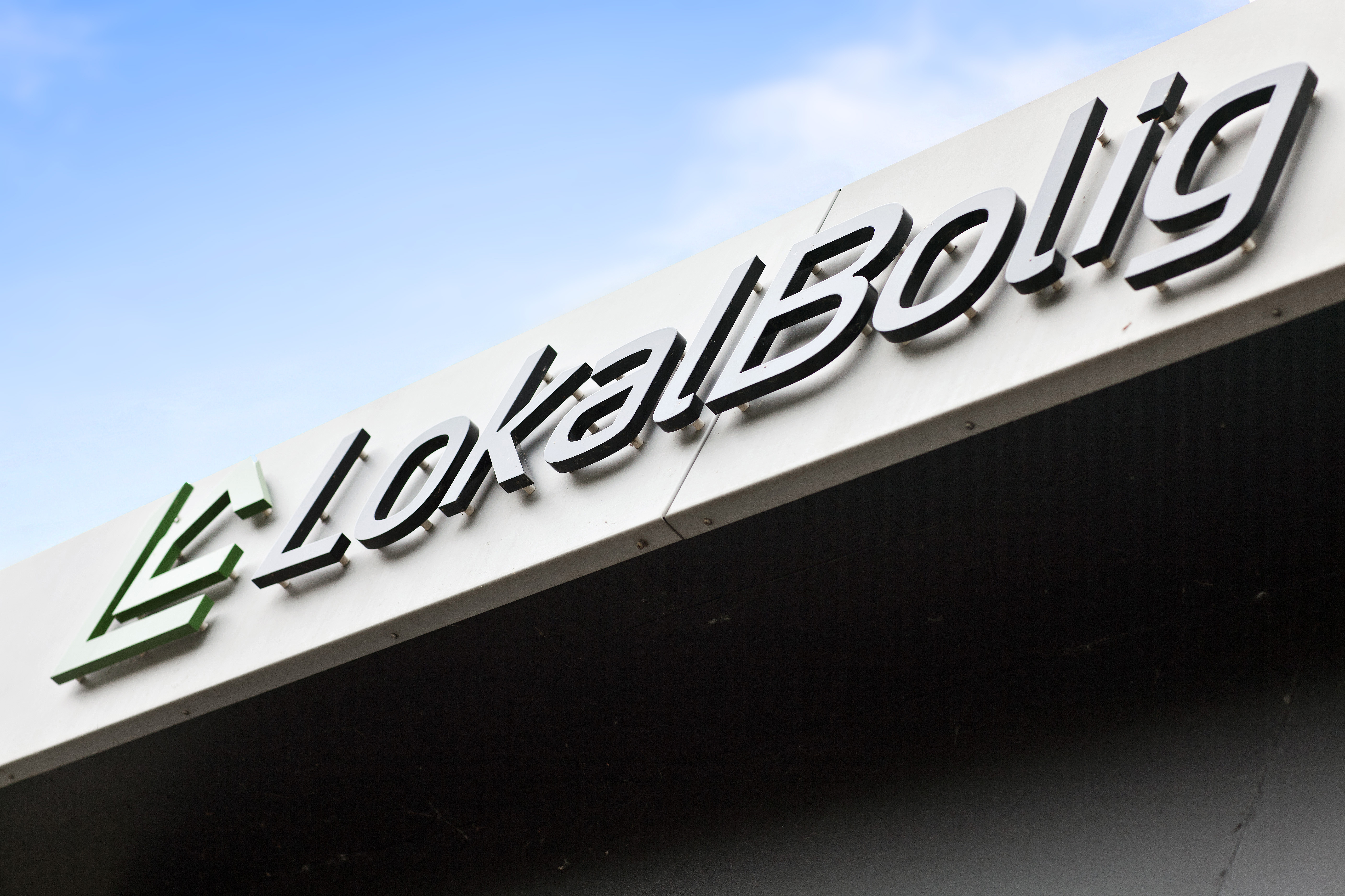 LokalBolig facadelogo